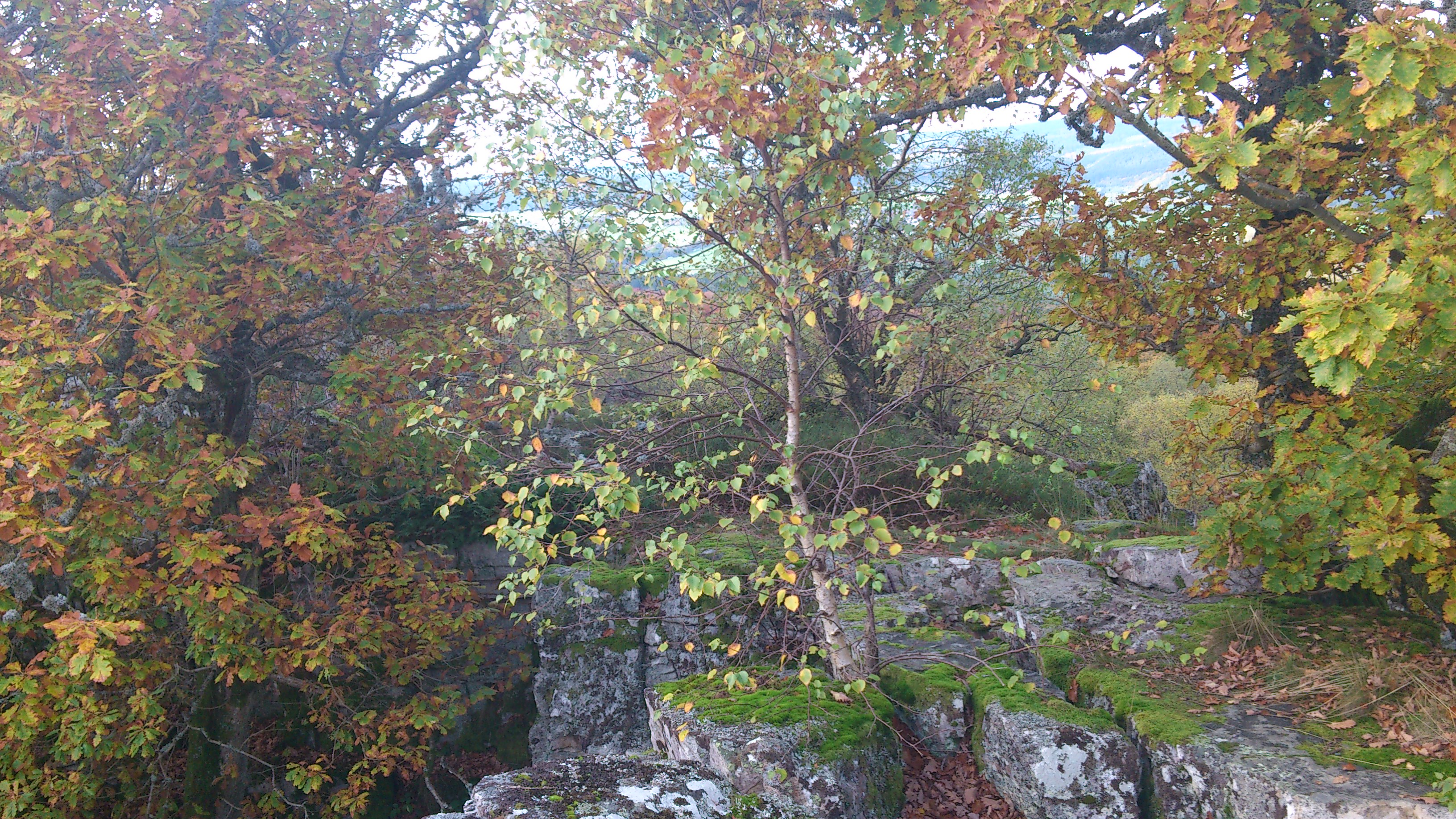 Von Kirschweiler kann man zum 628 m hohen Silberich wandern. Es handelt sich um einen bewaldeten Berg, der vermutlich eine frühgeschichtliche keltische Kultstätte war und deshalb auch Kirschweiler Festung genannt wird. – Naturschutzgebiet 7134-079 Kirschweiler Festung im Kreis Birkenfeld in Rheinland Pfalz im zukünftigen Nationalpark Hunsrück 2 km westlich von Kirschweiler.